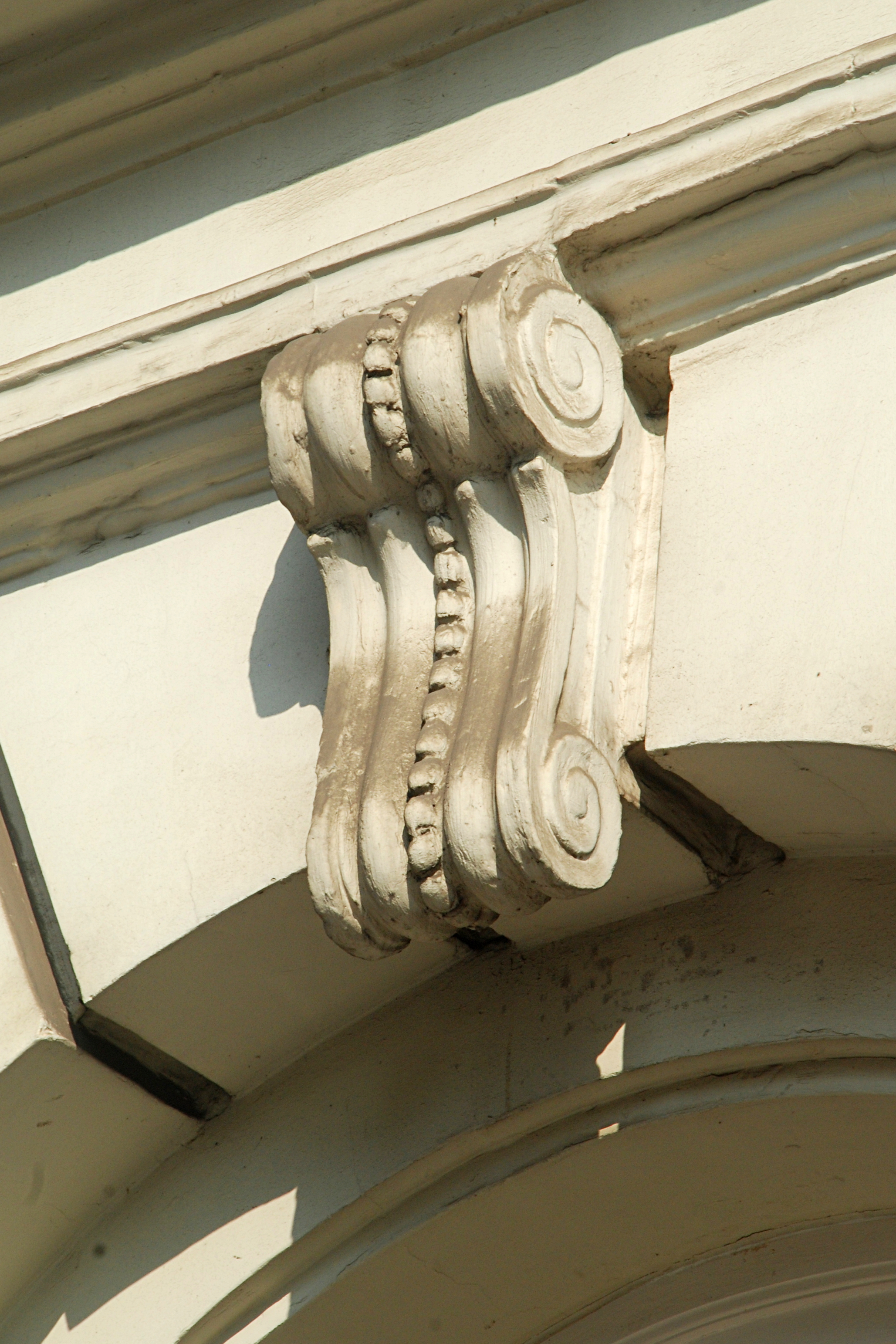 Belgique - Bruxelles - Hôtel des Brasseurs